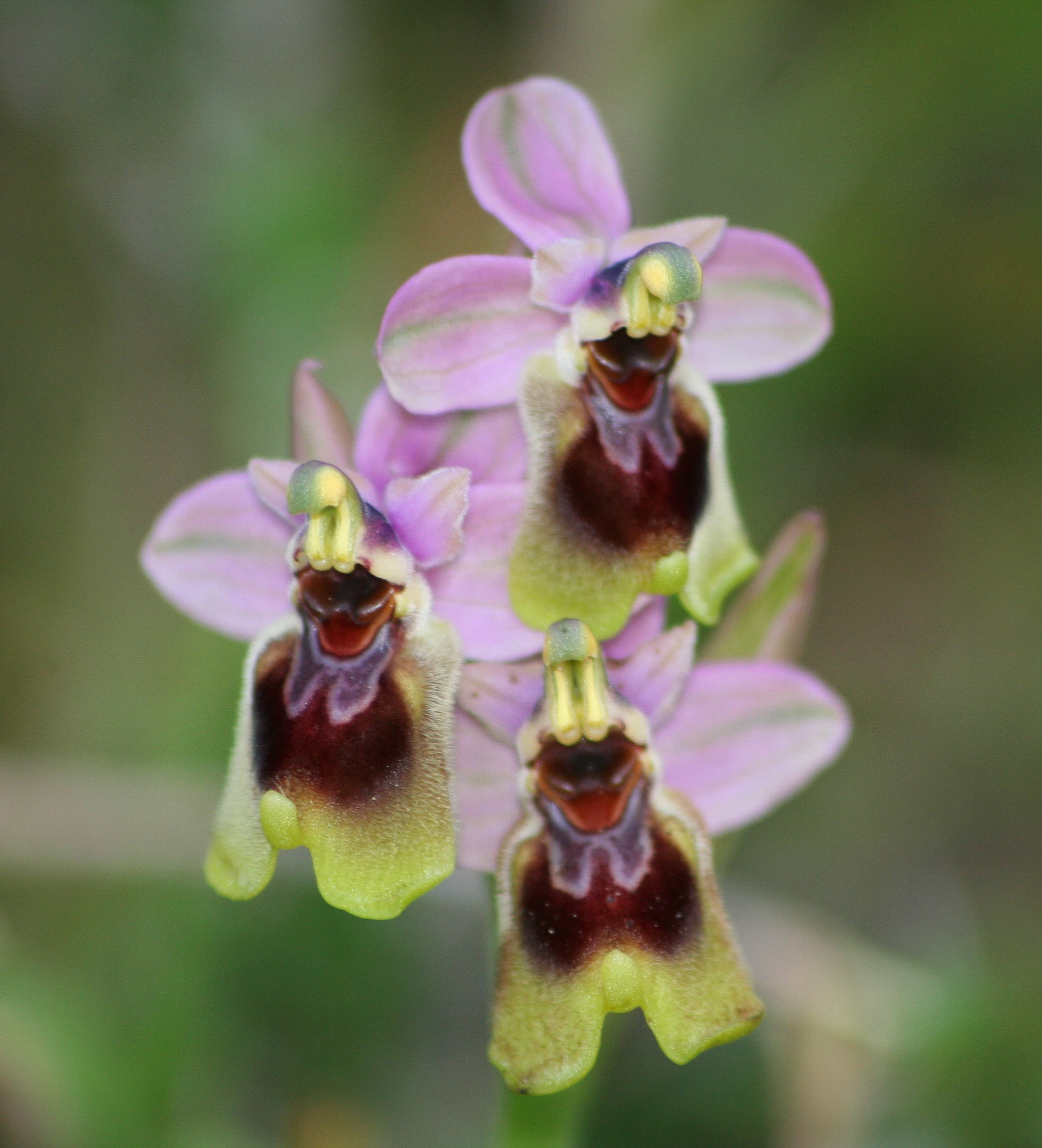 Ophrys tenthredinifera fotografada no Algarve Portugal